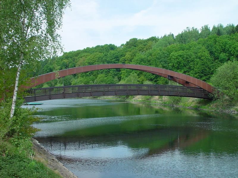 Die Ernst-Müller-Brücke über die Wupper-Vorsperre in Hückeswagen